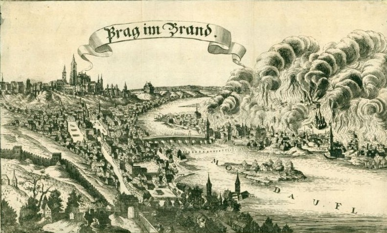 Prag im Brand, francouzský požár Prahy v roce 1689.